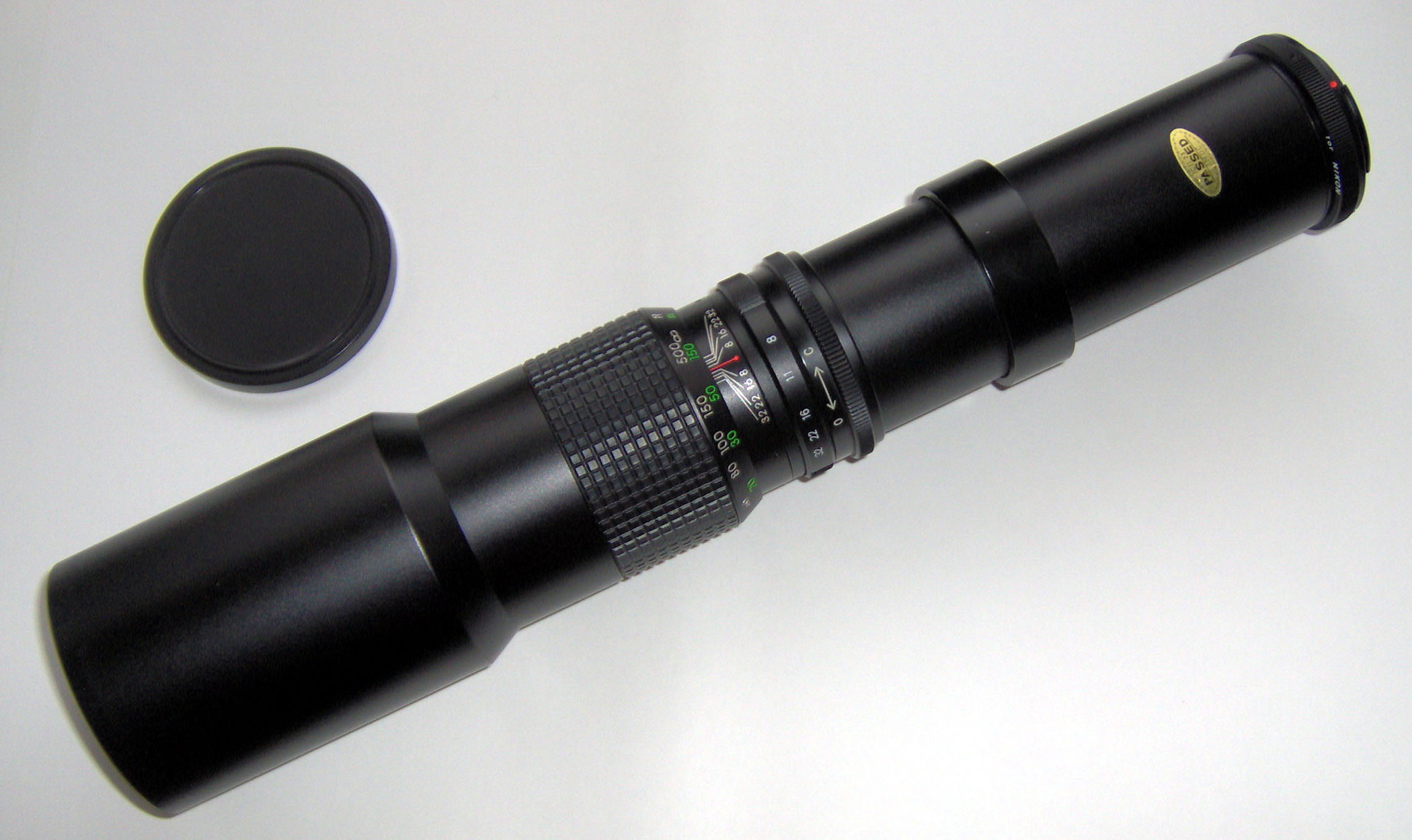 Ein preiswertes 500-mm-Fernobjektiv mit Vorwahl der Arbeitsblende für Kleinbild-Spiegelreflexkameras und T-2-Adapter. Die optische Konstruktion besteht aus zwei Elementen in einer Gruppe. Die Bildqualität ist, vom Kontrast abgesehen, in aller Regel durchaus befriedigend.